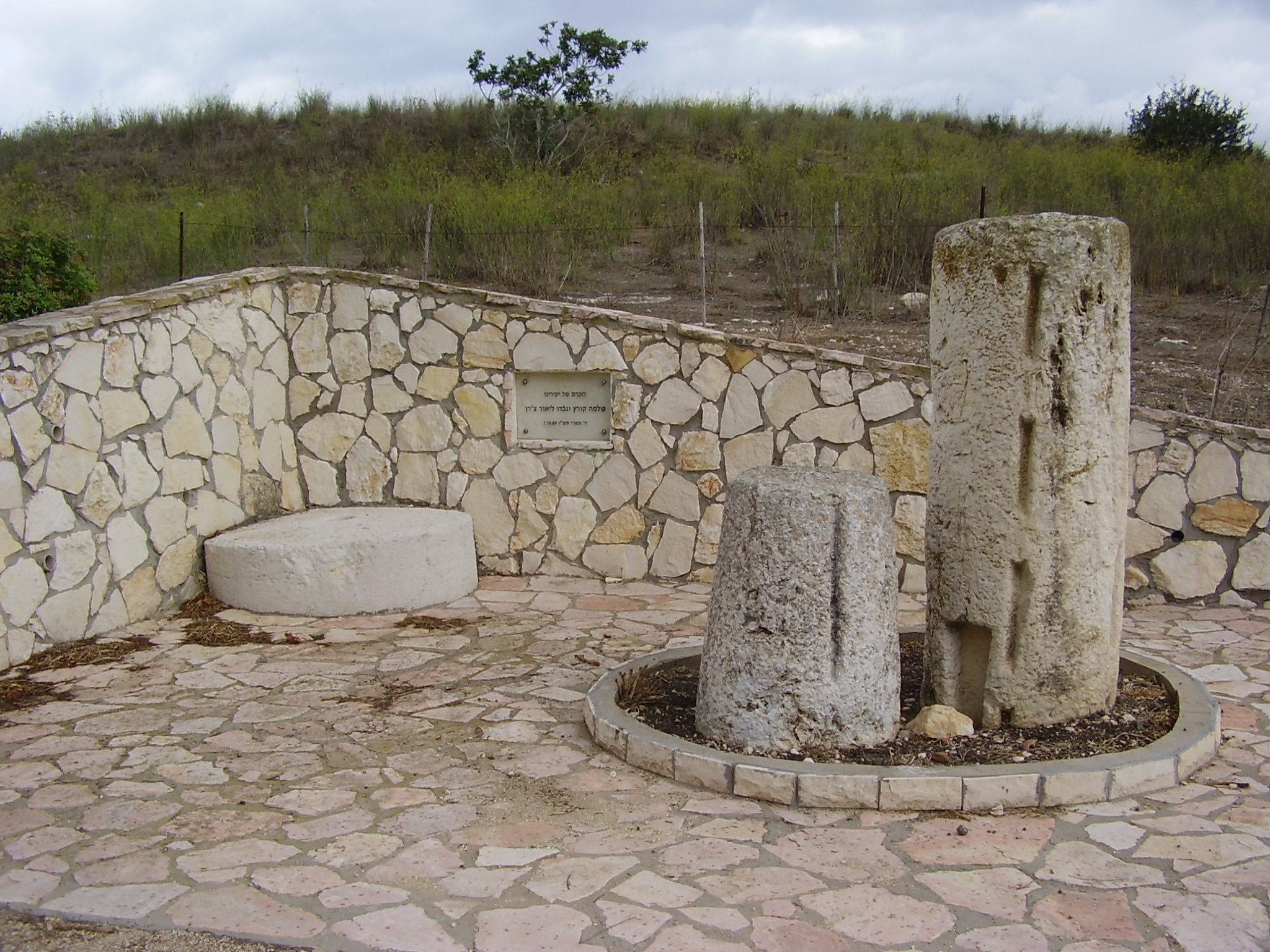 אנדרטת זיכרון ביער הקיבוצים לשלמה קורץ ולנכדו ליאור צ'רן שנהרגו באזור זה ב-7/10/89 כשעסקו בחפירה ארכיאולגית ונקברו תחת האדמה.